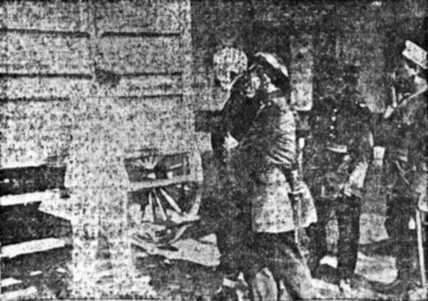 Fotografía de Antonio Ramón Ramón del 14 de diciembre de 1914, donde es conducido por soldados luego de su atentado en contra del general Roberto Silva Renard, ejecutor de la Matanza de la Escuela Santa María de Iquique, efectuada en 1907.